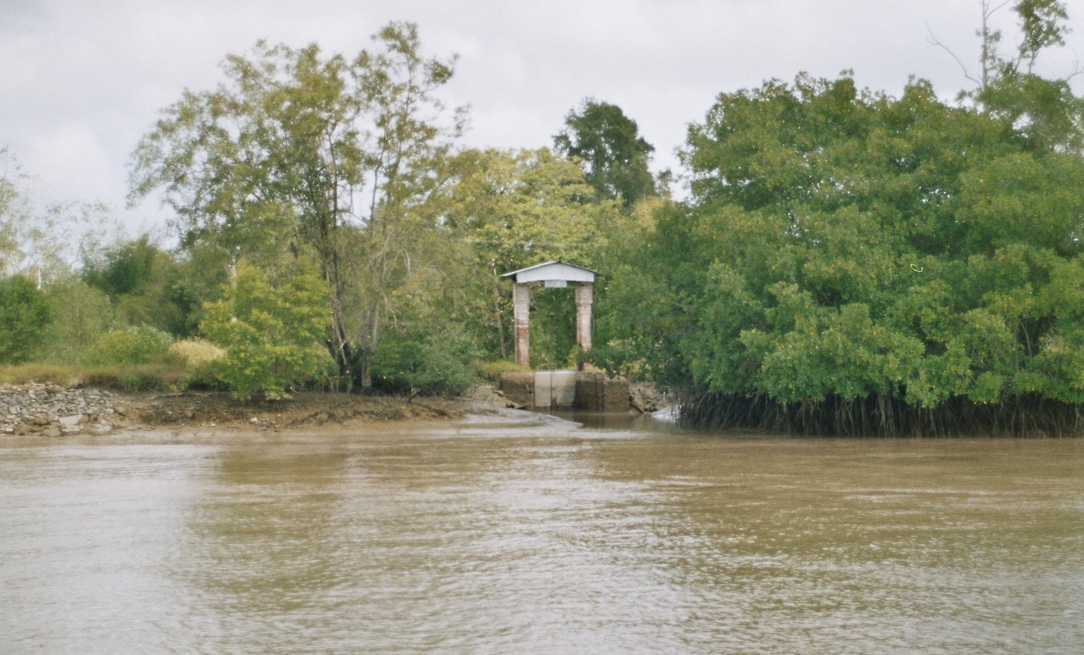 Eigen foto. Sluis van de plantage Berlijn aan de Commewijne, februari 2004